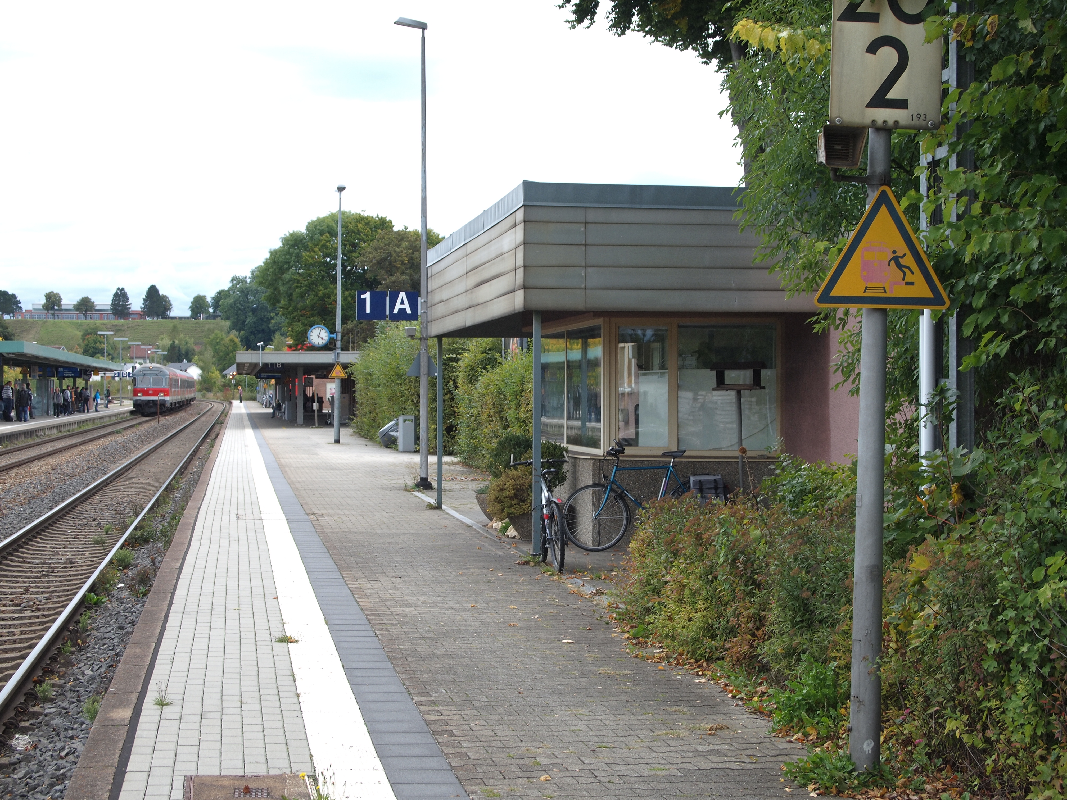 Kaufbeuren Bahnhof, Gleis 1 von Nordosten nach Südwesten. Im Vordergrund Stellwerk Kaufbeuren, Typ Sp Dr L30 von 1970